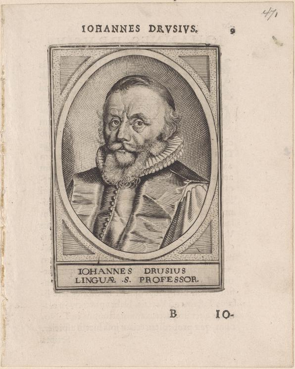 Prent van Johannes Drusius, Collectie Bodel Nijenhuis 471, Bijzondere Collecties, Universiteitsbibliotheek Leiden